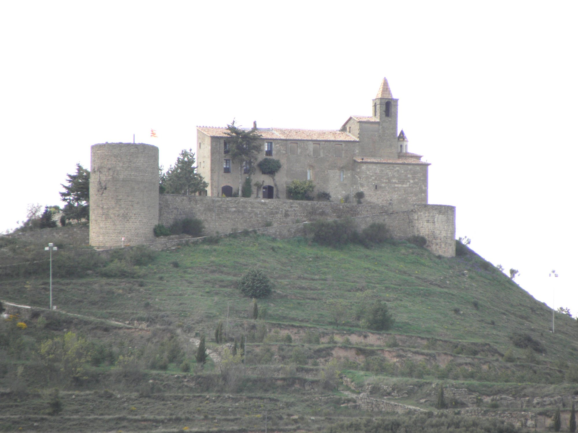 El Castellvell (Olius, Solsonès)